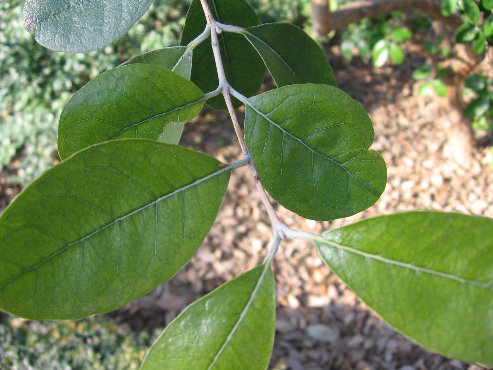 Acca sellowiana Foto tomada en el RJB de Madrid.